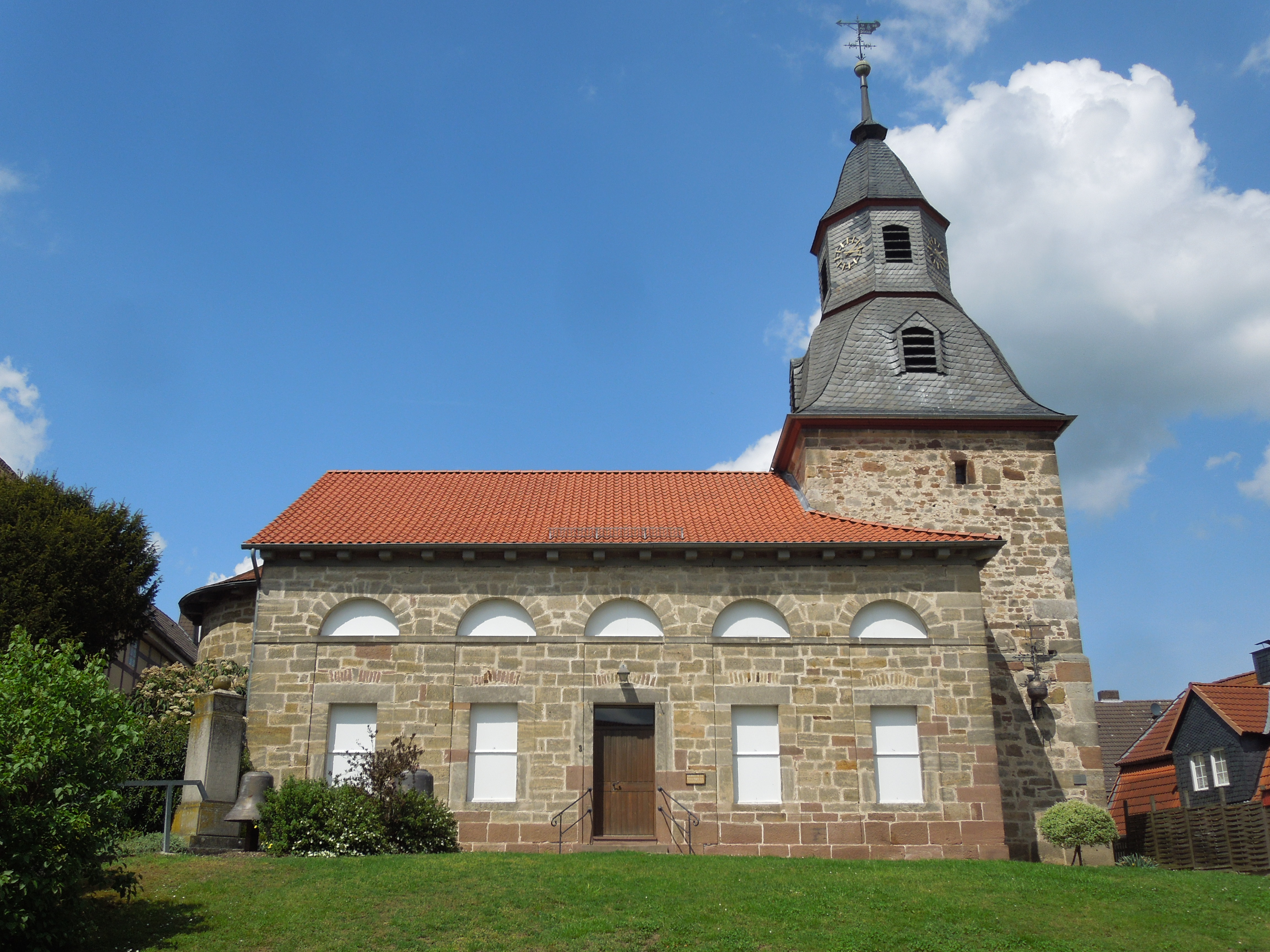 Altendorf (Naumburg): Südseite der Bonifatiuskirche